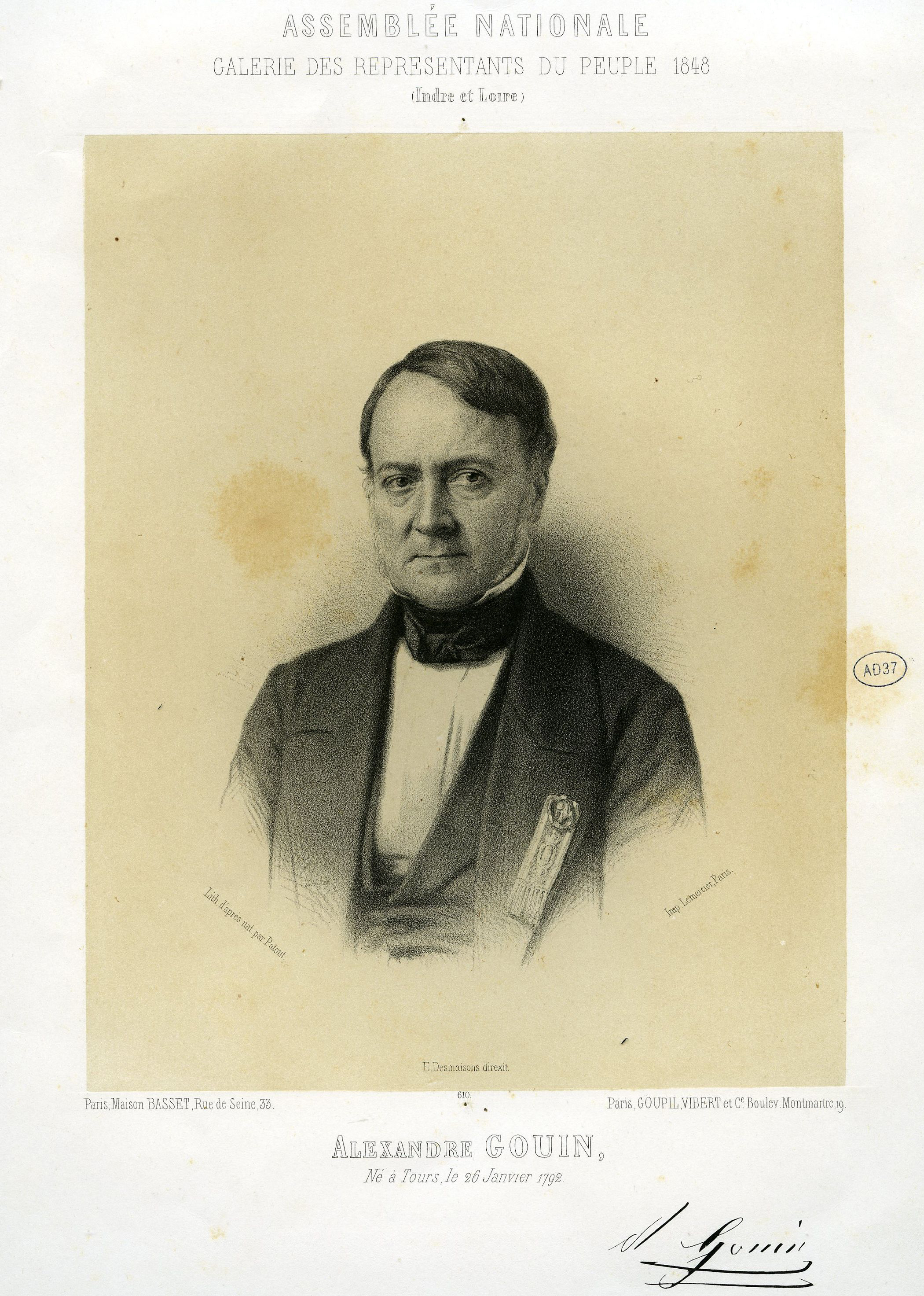 Alexandre Goüin (1792-1872), banquier et ministre français